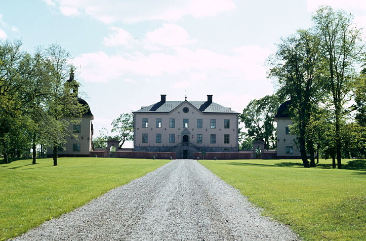 Hässelby Slott; gårdssidan med huvudbyggnad och flyglar